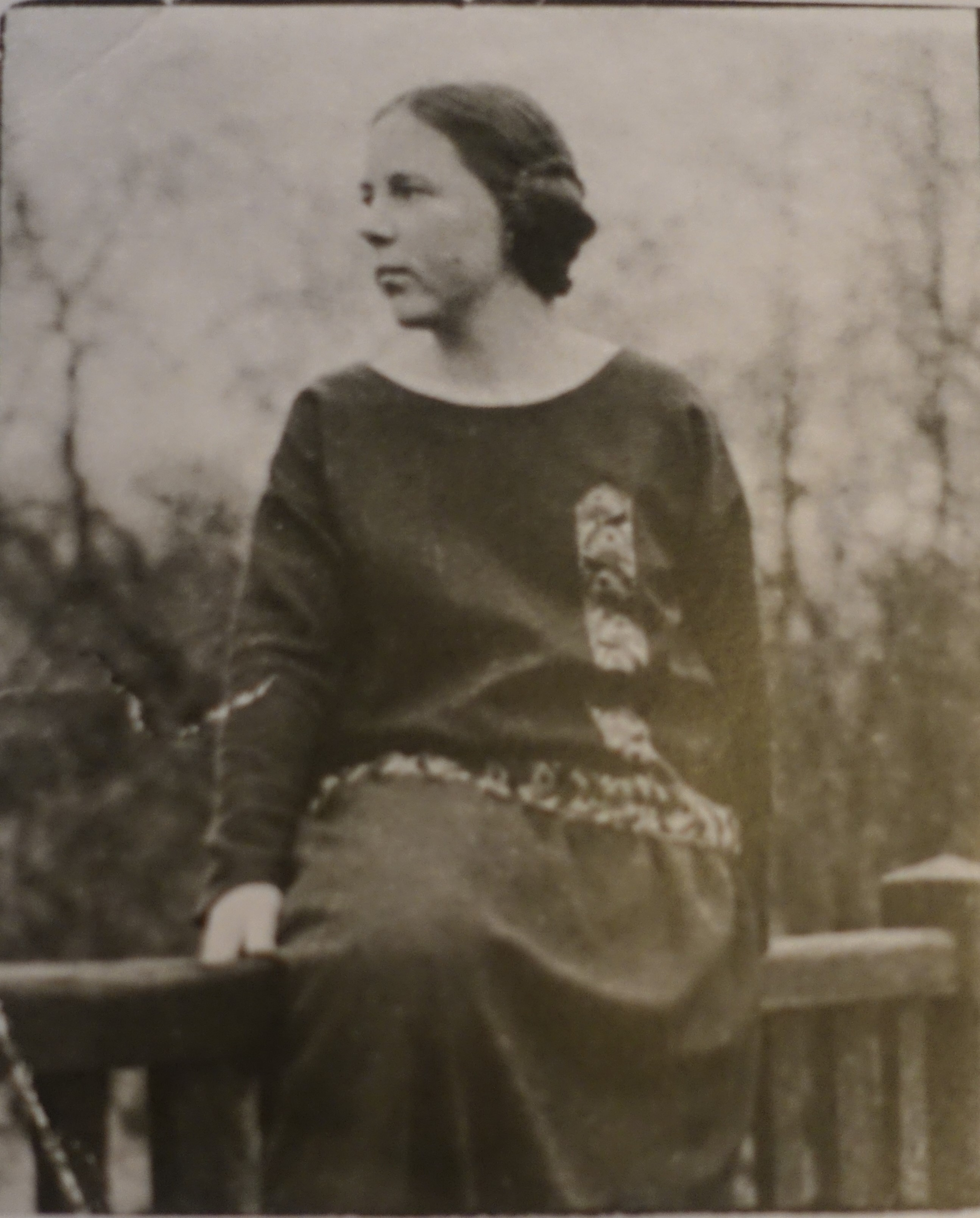 Lucie Suhling Widerstandskämpferin in den 20er Jahren